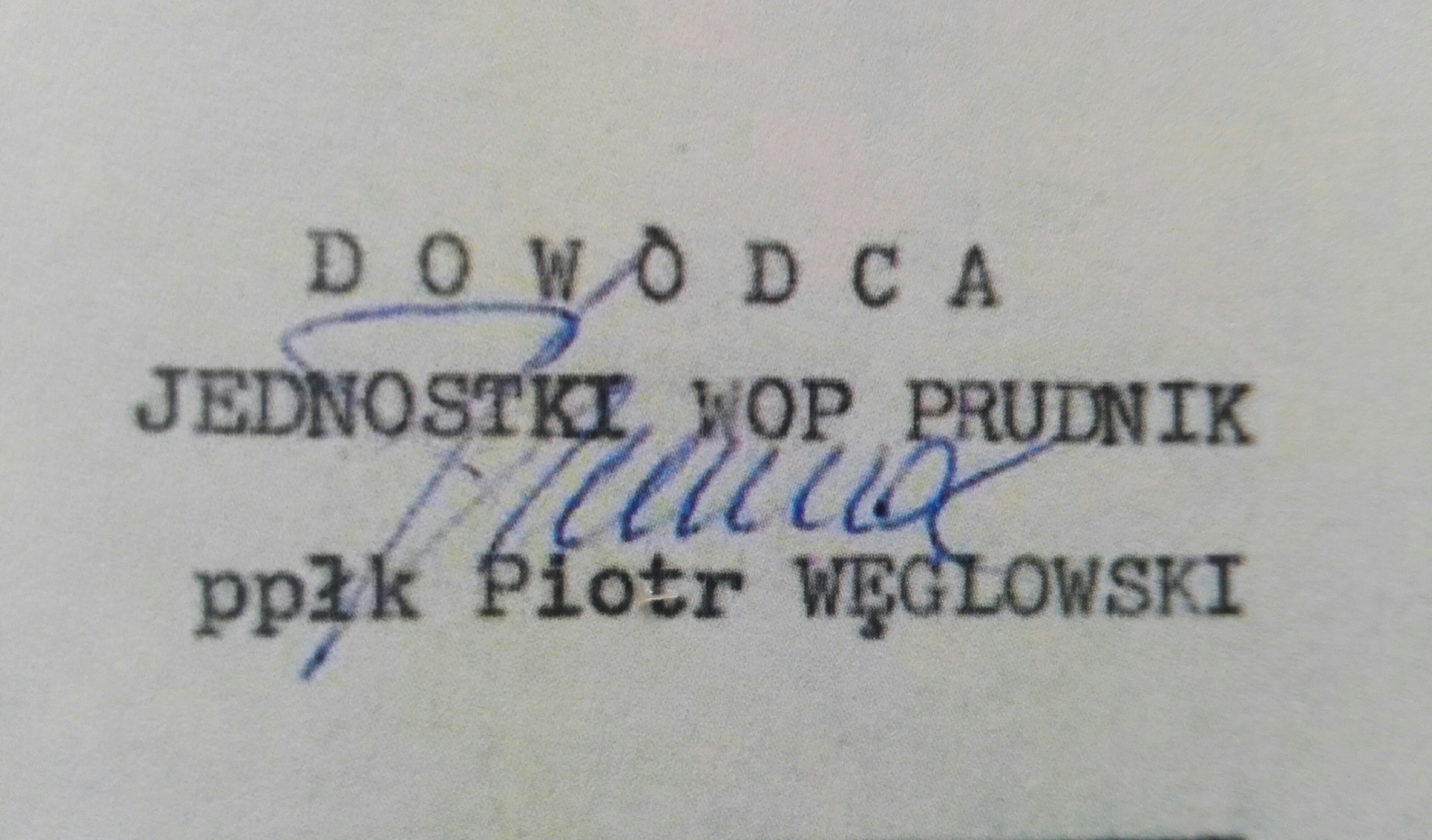 Podpis dowódcy batalionu granicznego Wojsk Ochrony Pogranicza w Prudniku ppłk. Piotra Węglowskiego, Prudnik 1987.08.17